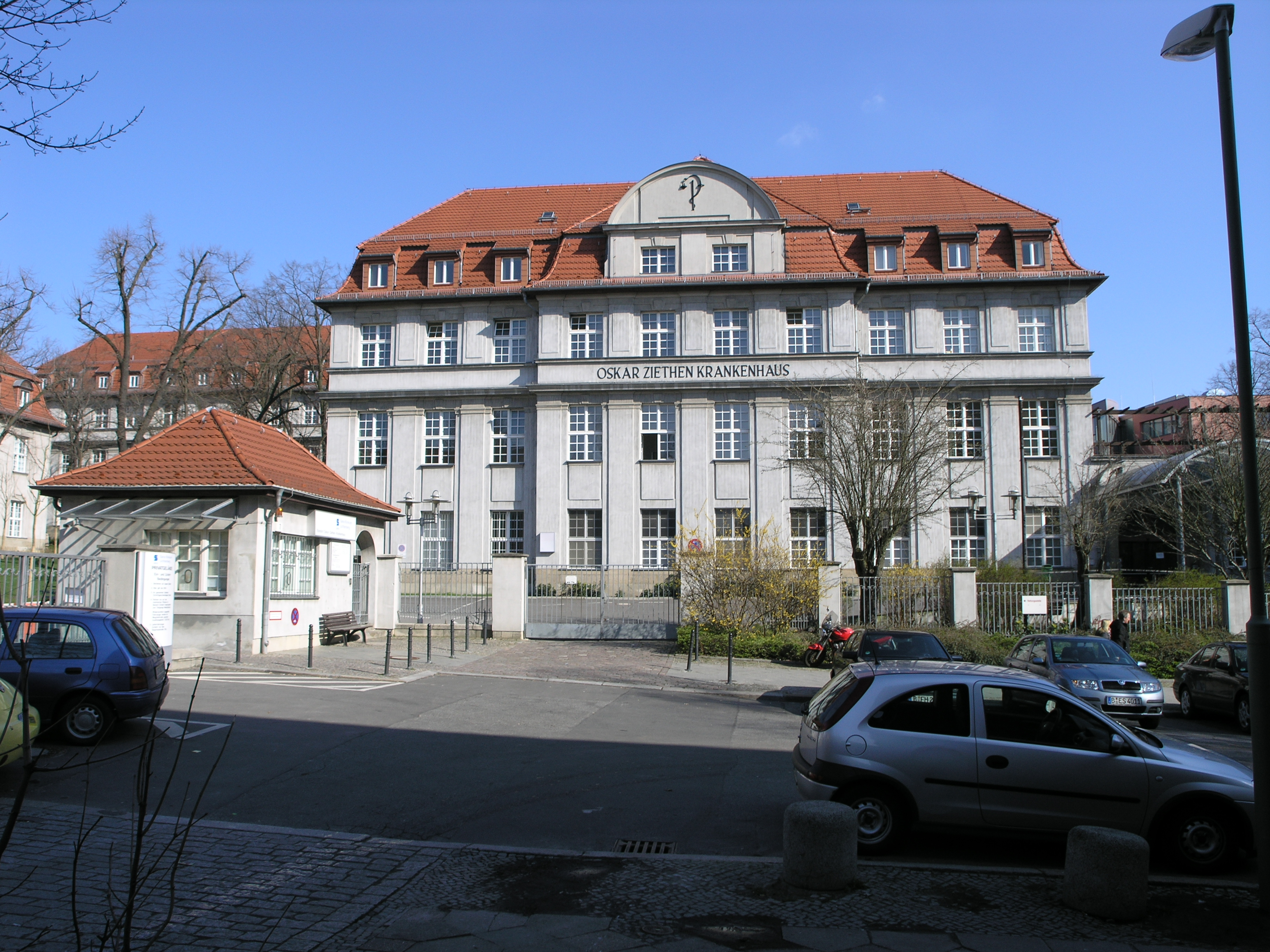 Eingangsbereich des OZK mit Original-Schriftzug